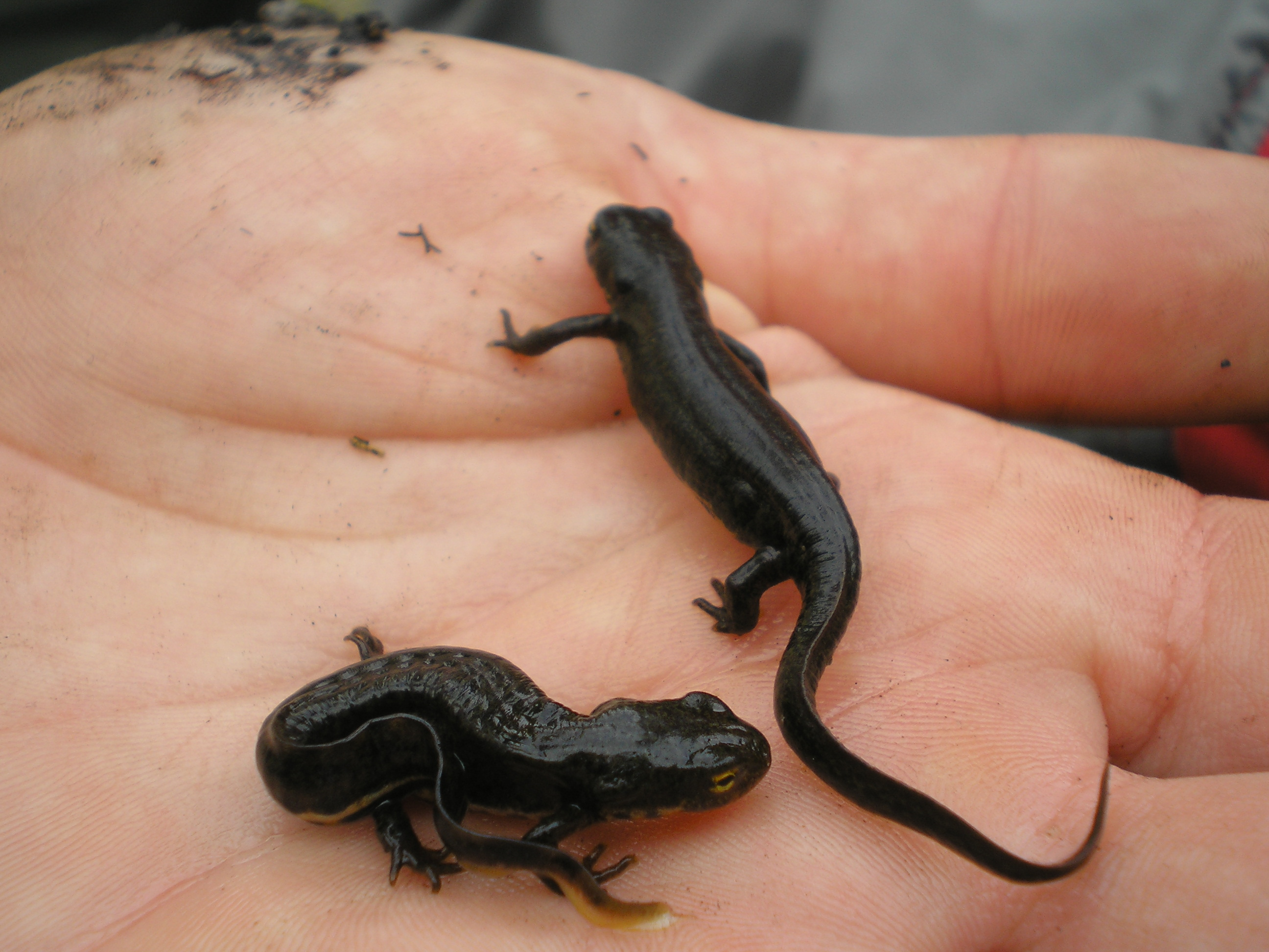 Triturus boscai in Galicia, Spain.